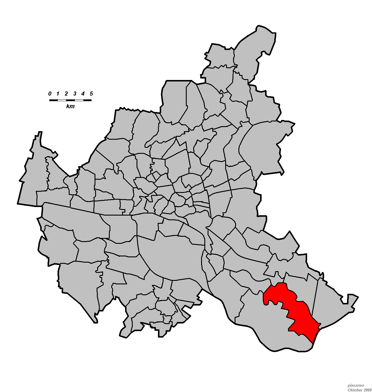 Hamburg, Stadtteil Neuengamme